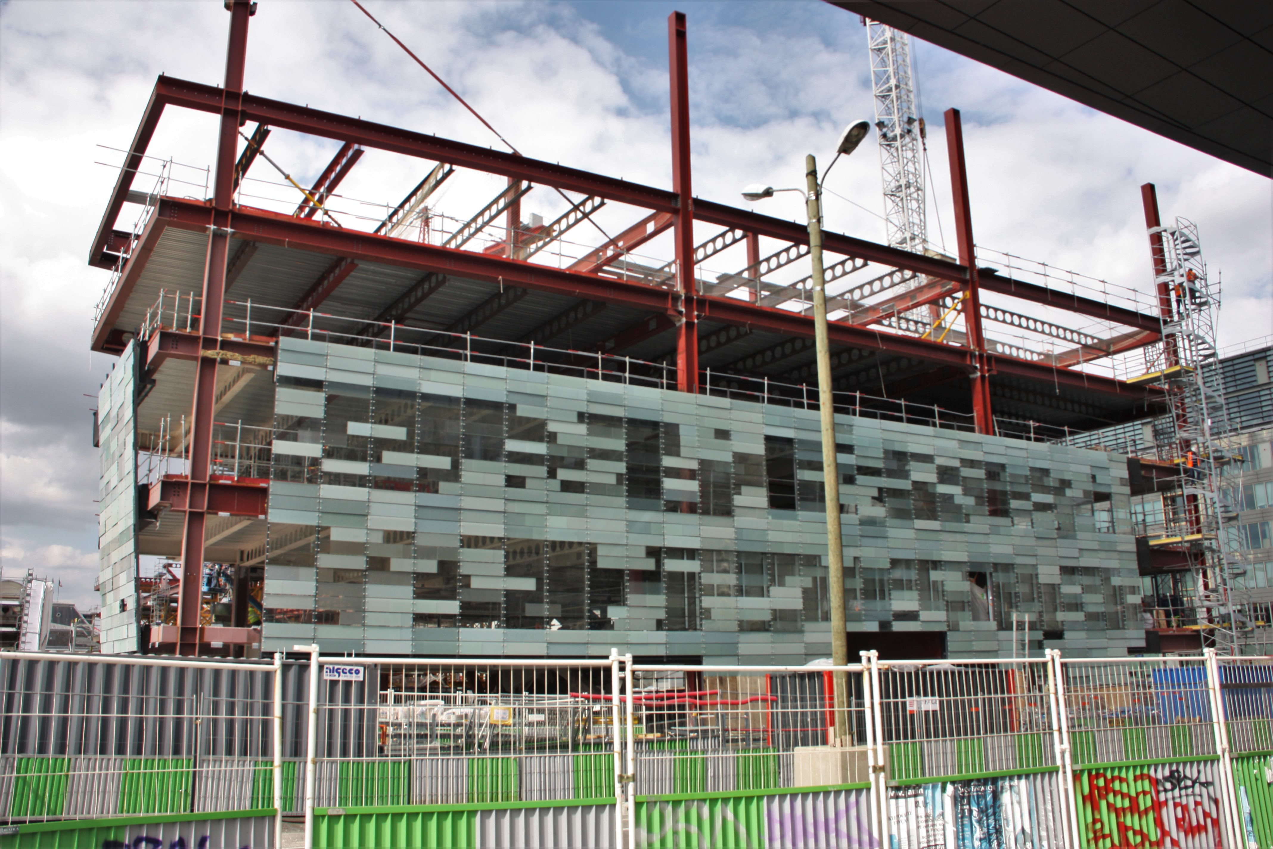 Paris Rive Gauche